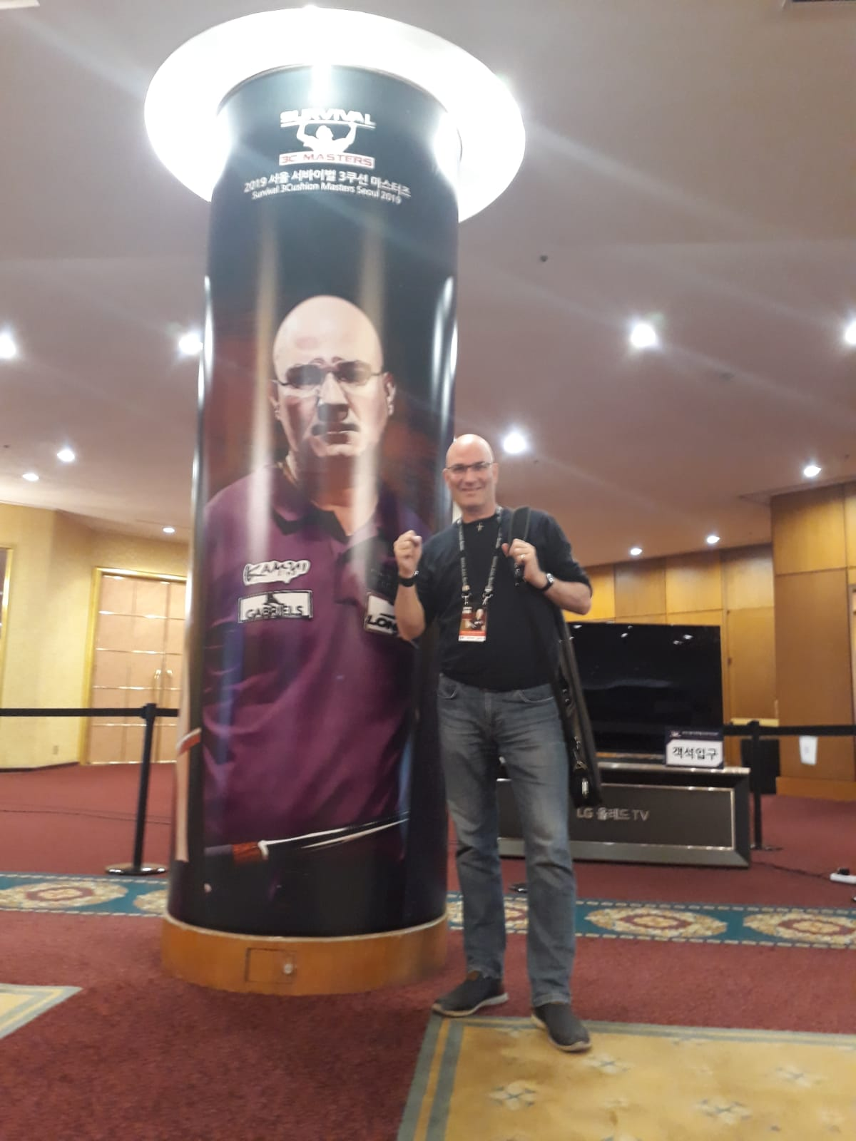 siehe Dateiname Grand Hilton, Seoul